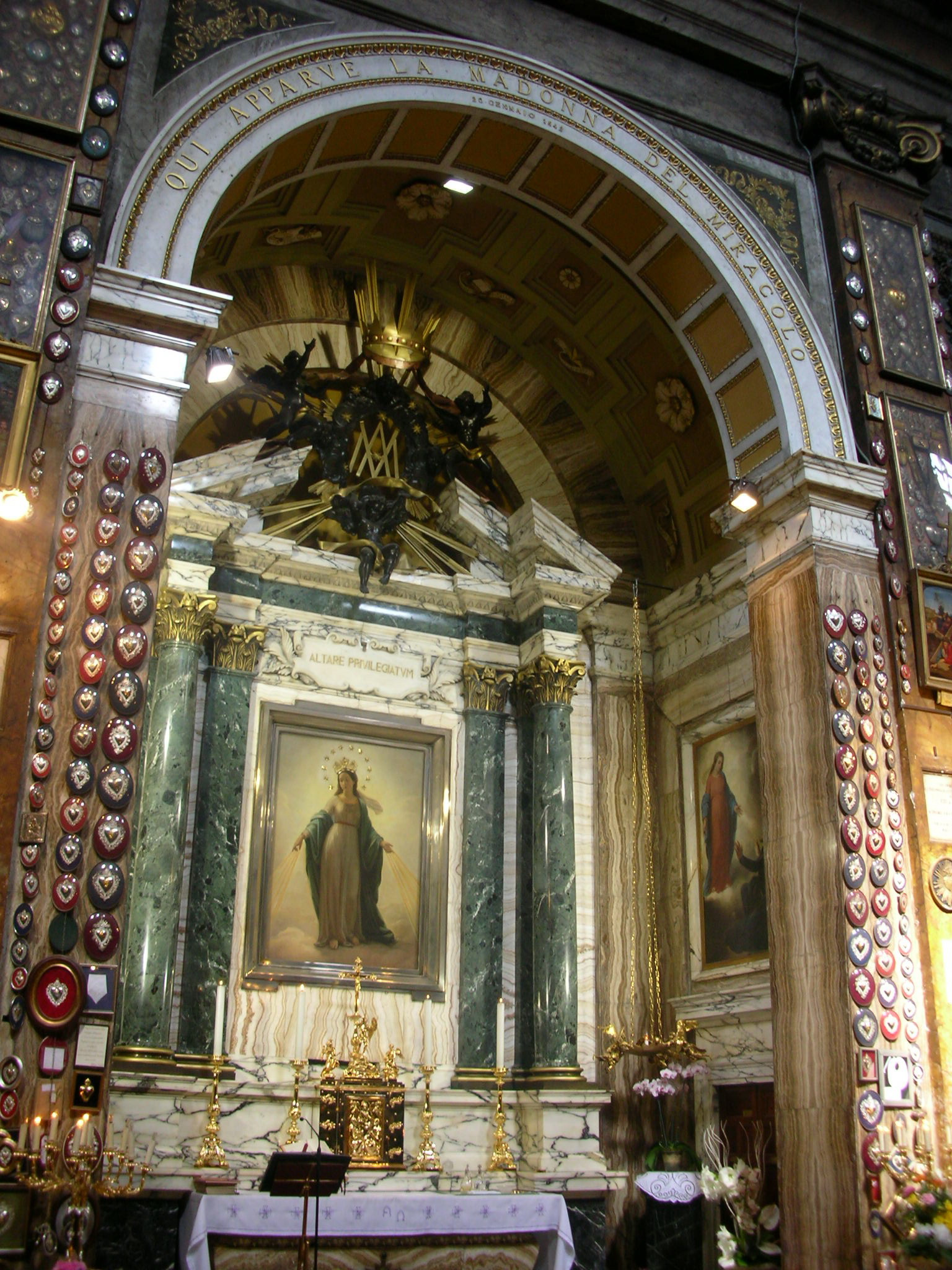 Sant'Andrea delle Fratte, Cappella della Madonna del Miracolo (Roma)